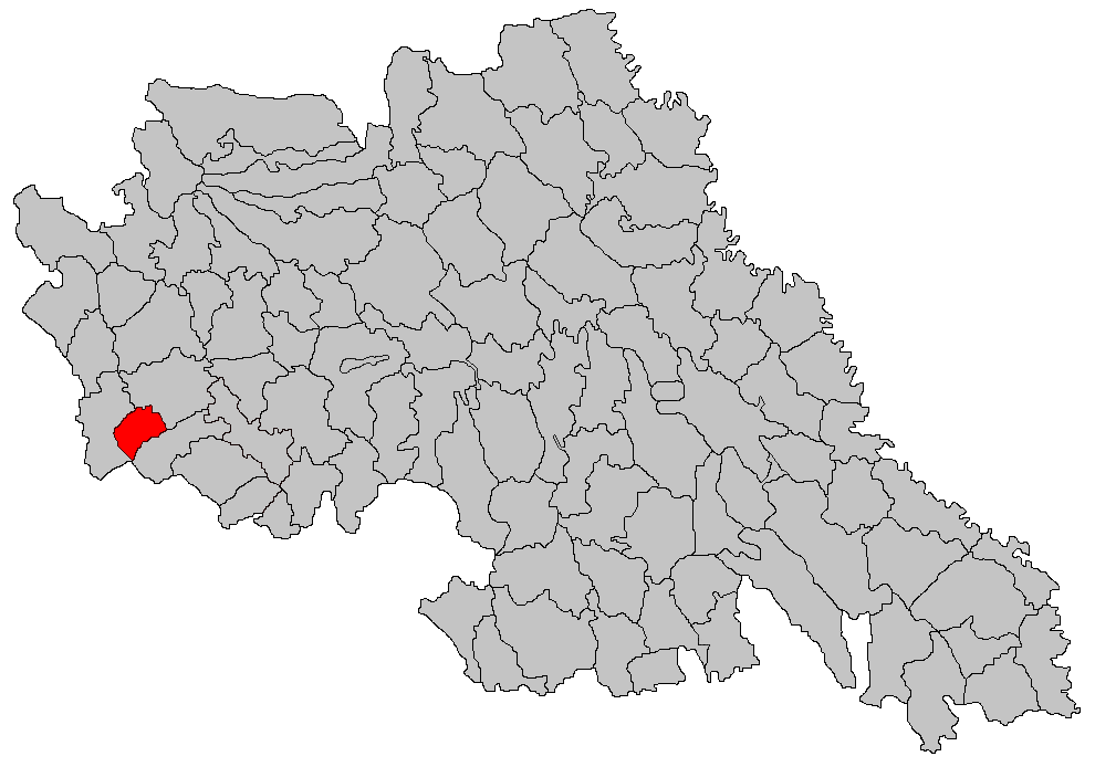 Categorie:Hărţi ale judeţului Iaşi